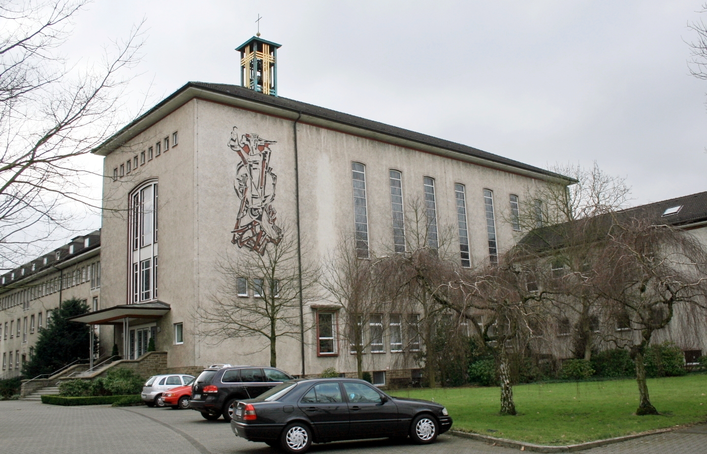 Heilig-Geist-Kloster Steyler-Missionsschwestern im Ortsteil Wimbern der Gemeinde Wickede (Ruhr).